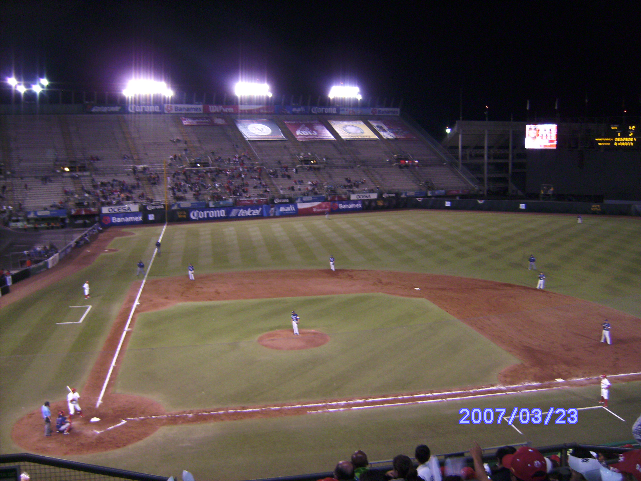 Foto del juego 2 de la serie final de la LMB 2008.